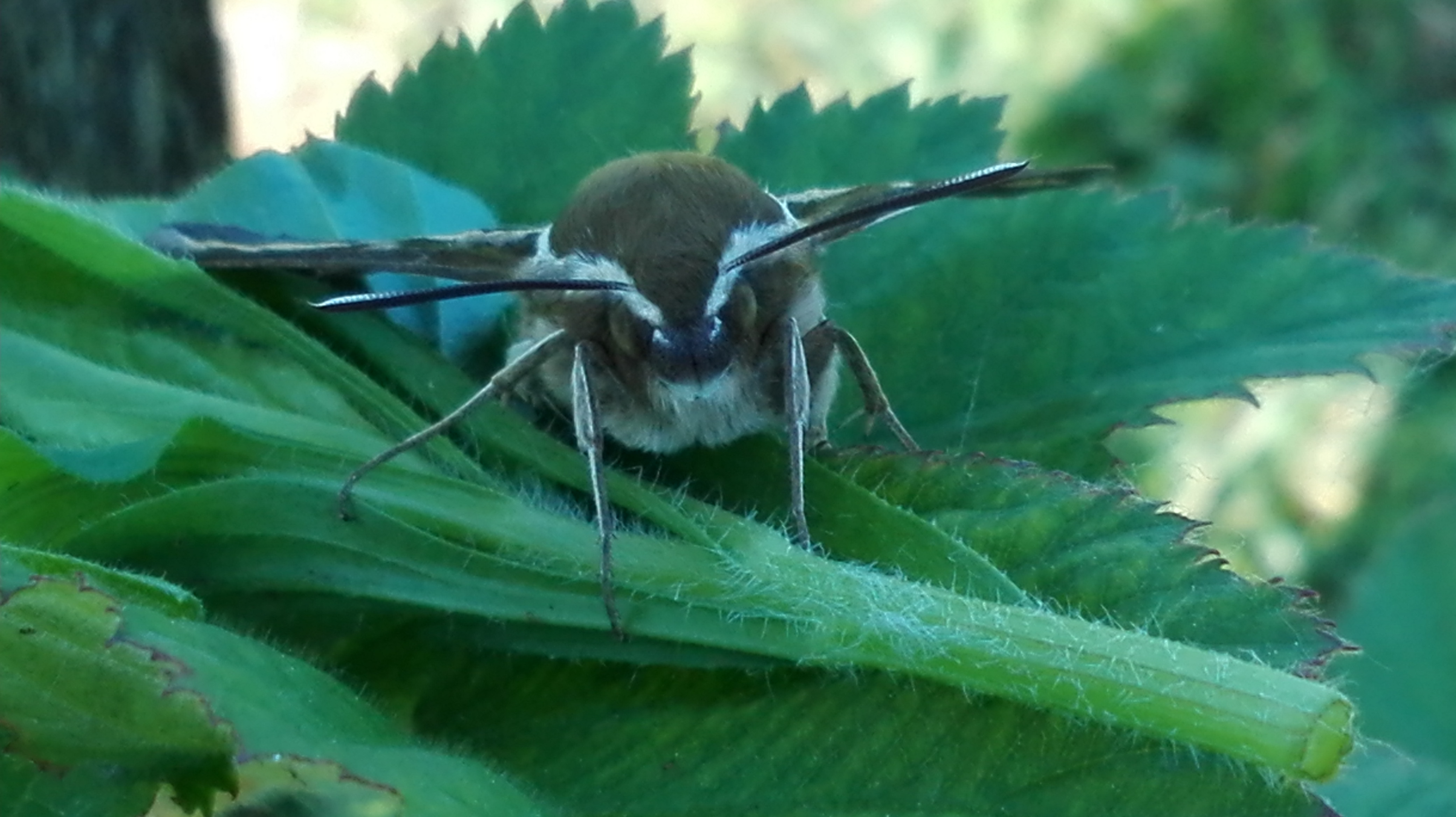 Hyles gallii